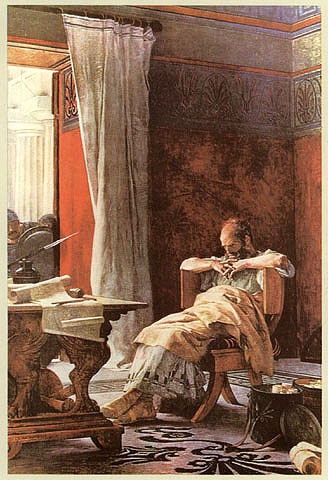 Archimede pensatore raffigurato dal pittore italiano Nicolò Barabino. Opera d'arte coservata presso il Museo Civico Revoltella di Trieste.